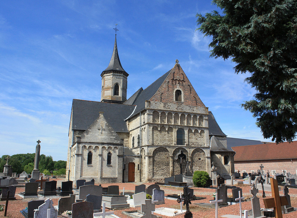 Parochiekerk Sint-Gillis te Kumtich